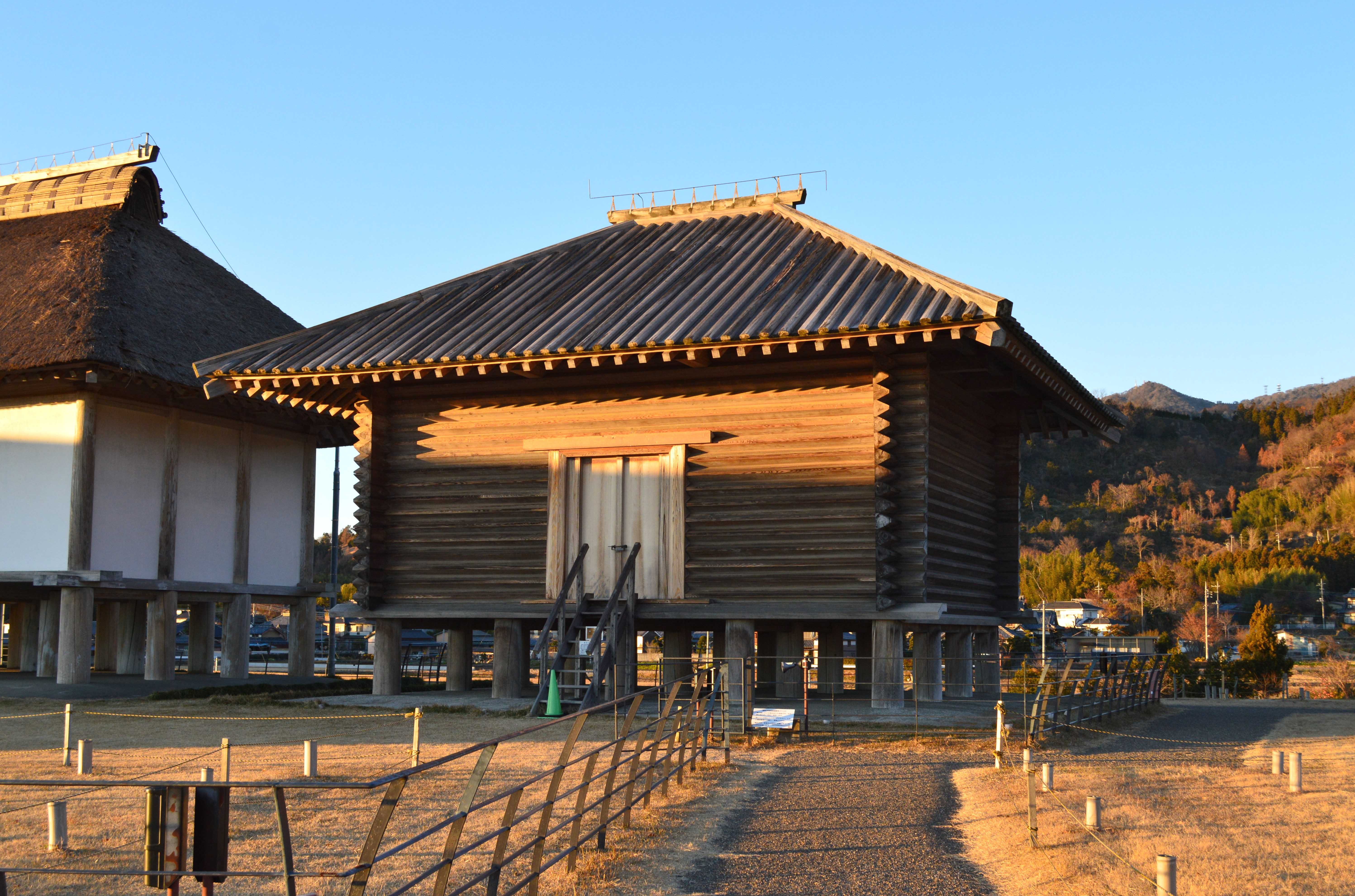 平沢官衙遺跡 校倉